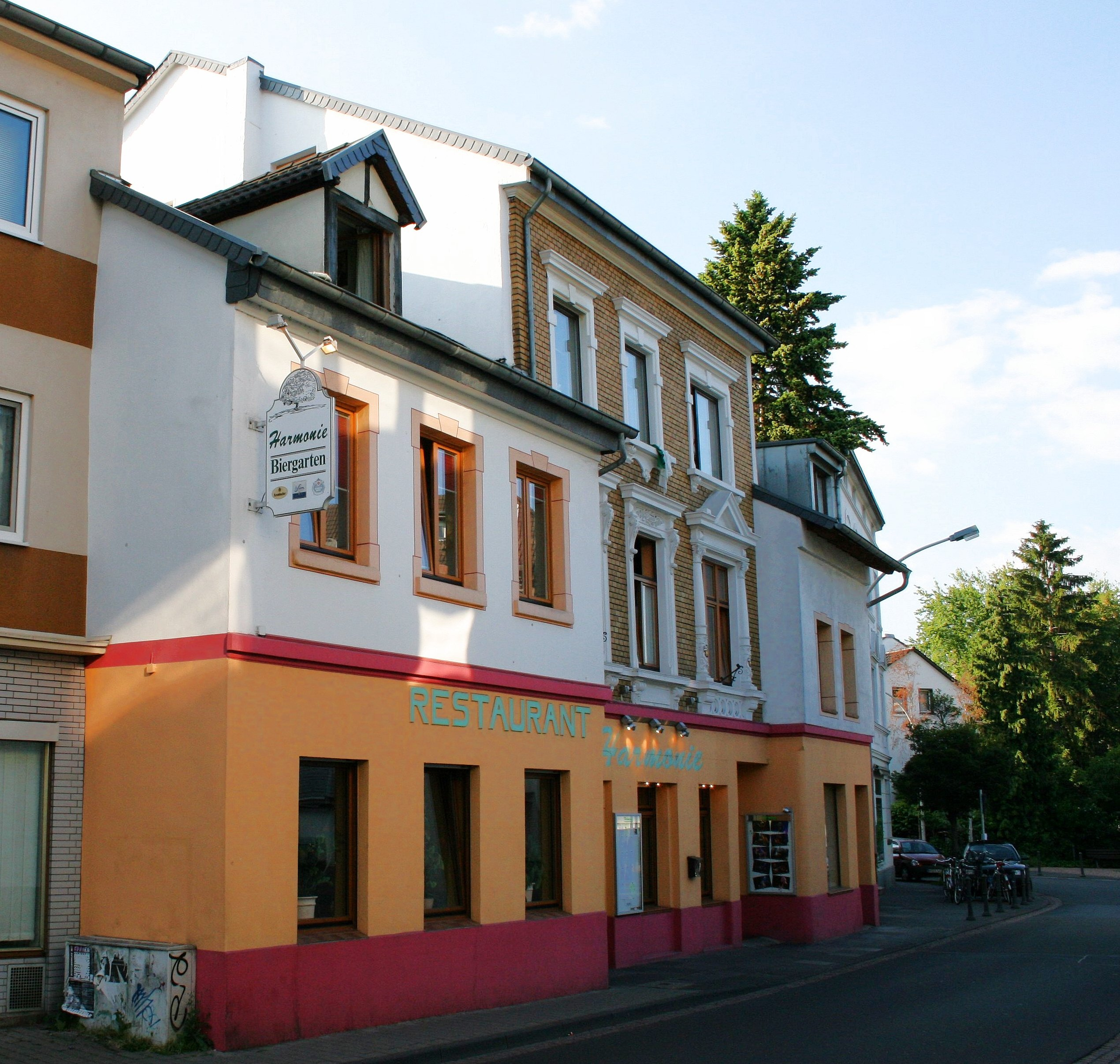 Lokal Harmonie in der Frongasse in Bonn-Endenich (Restaurant & Kneipe mit Biergarten im Innenhof und angeschlossenem Veranstaltungs- und Konzertsaal inklusive Bühne, Theke und Empore)